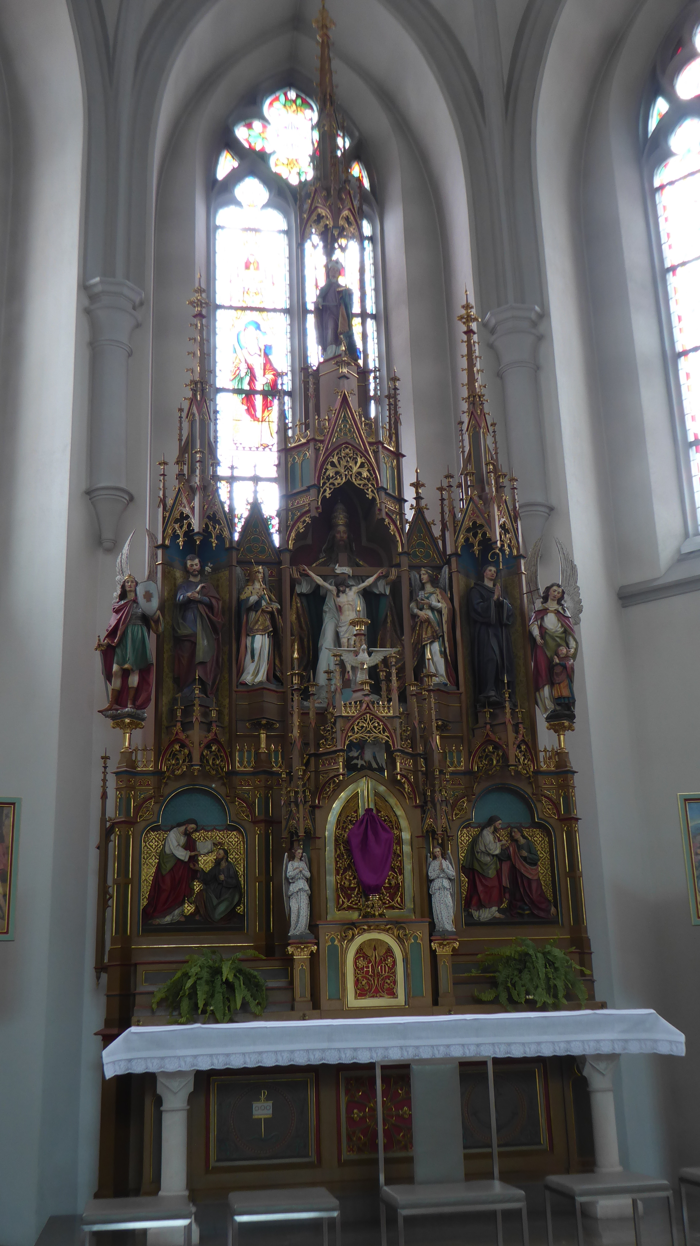 Pfarrkirche Ruggell FL: Hochaltar aus dem Jahr 1908, geschaffen von Fidelis Rudhart aus Altenstadt